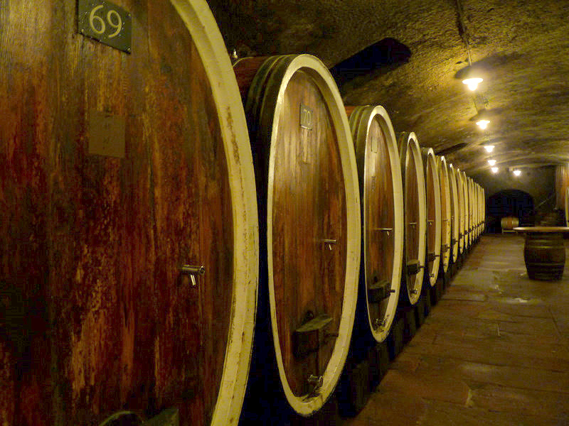 Tonel 69!